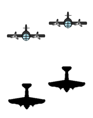 Flugformation Rotte